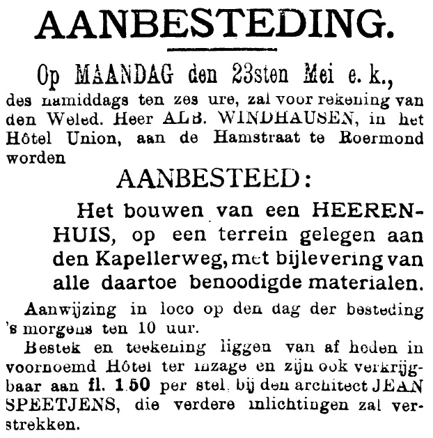 Aanbesteding heerenhuis Alb. Windhausen in Roermond op 23 mei 1898. Afkomstig uit De Nieuwe Koerier, zaterdag 14 mei 1898, [p. 2].